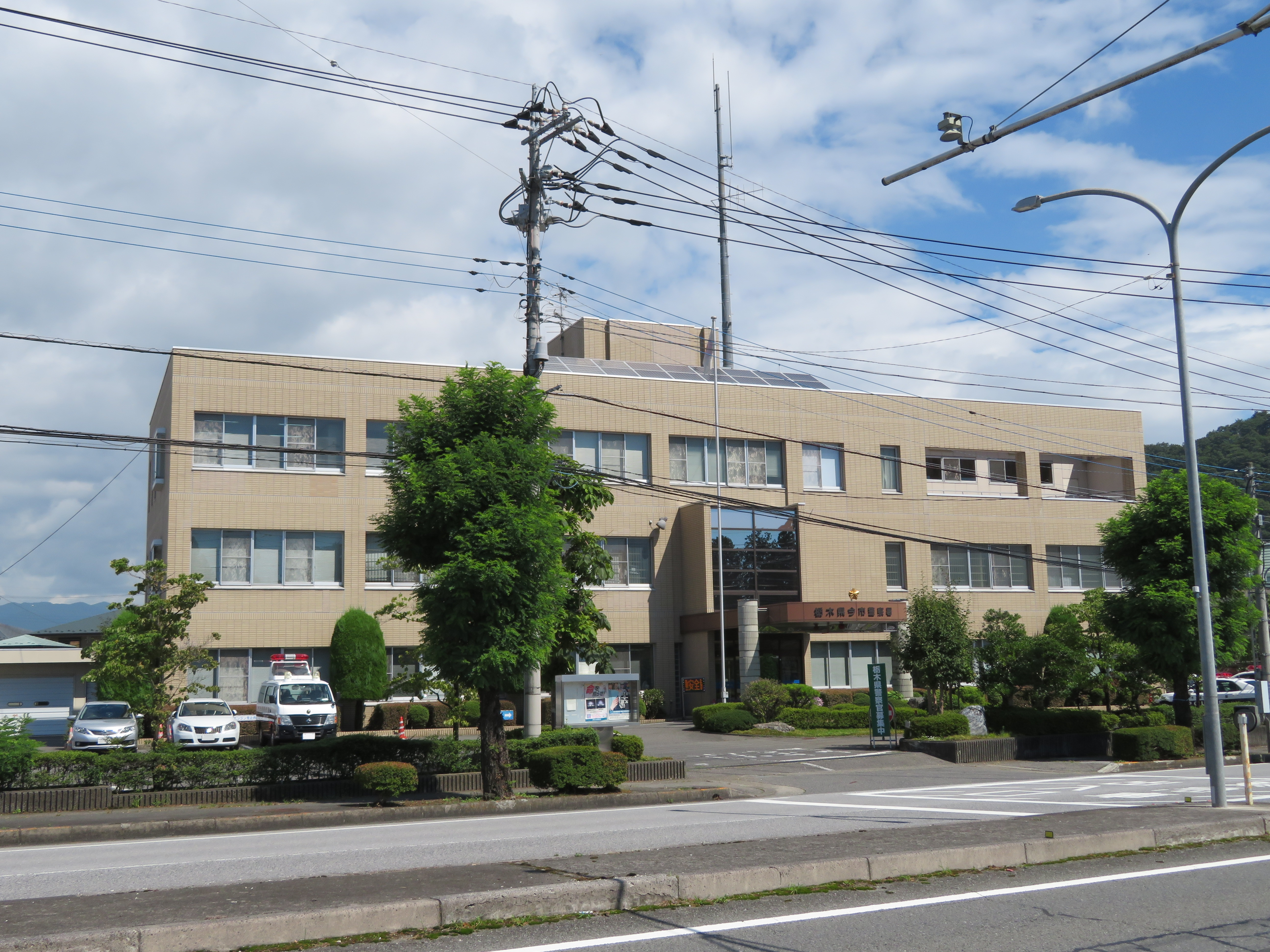 栃木県今市警察署庁舎 Canon PowerShot SX720 HS